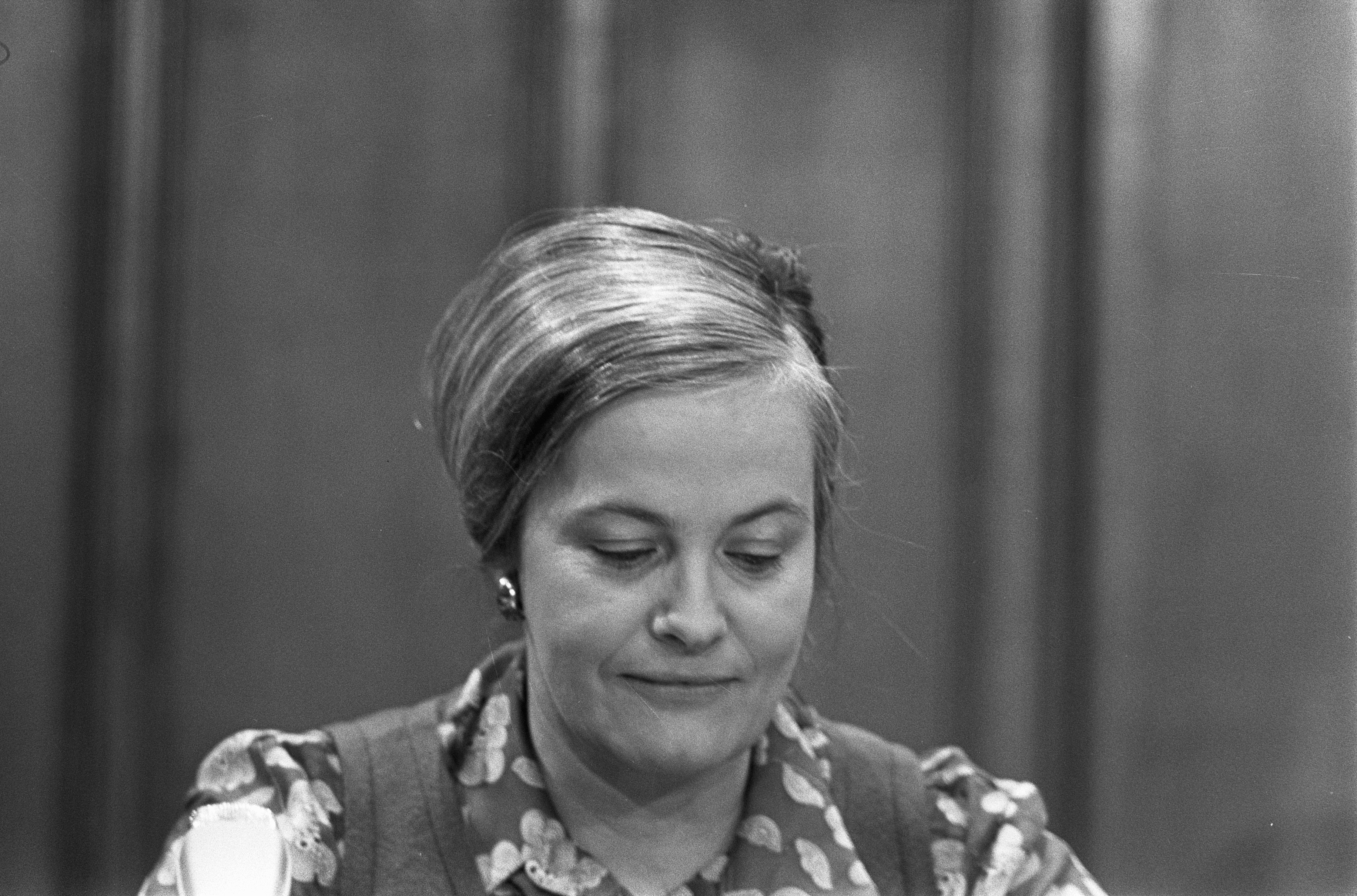 Hella Haasse tijdens een bijeenkomst van de Maatschappij der Nederlandse Letterkunde in het Koninklijk Insitituut voor de Tropen, Amsterdam (9 april 1970)